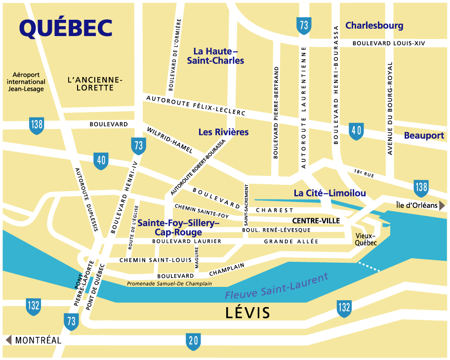 Voies d'accès de la ville de Québec, province de Québec, Canada (décembre 2009)